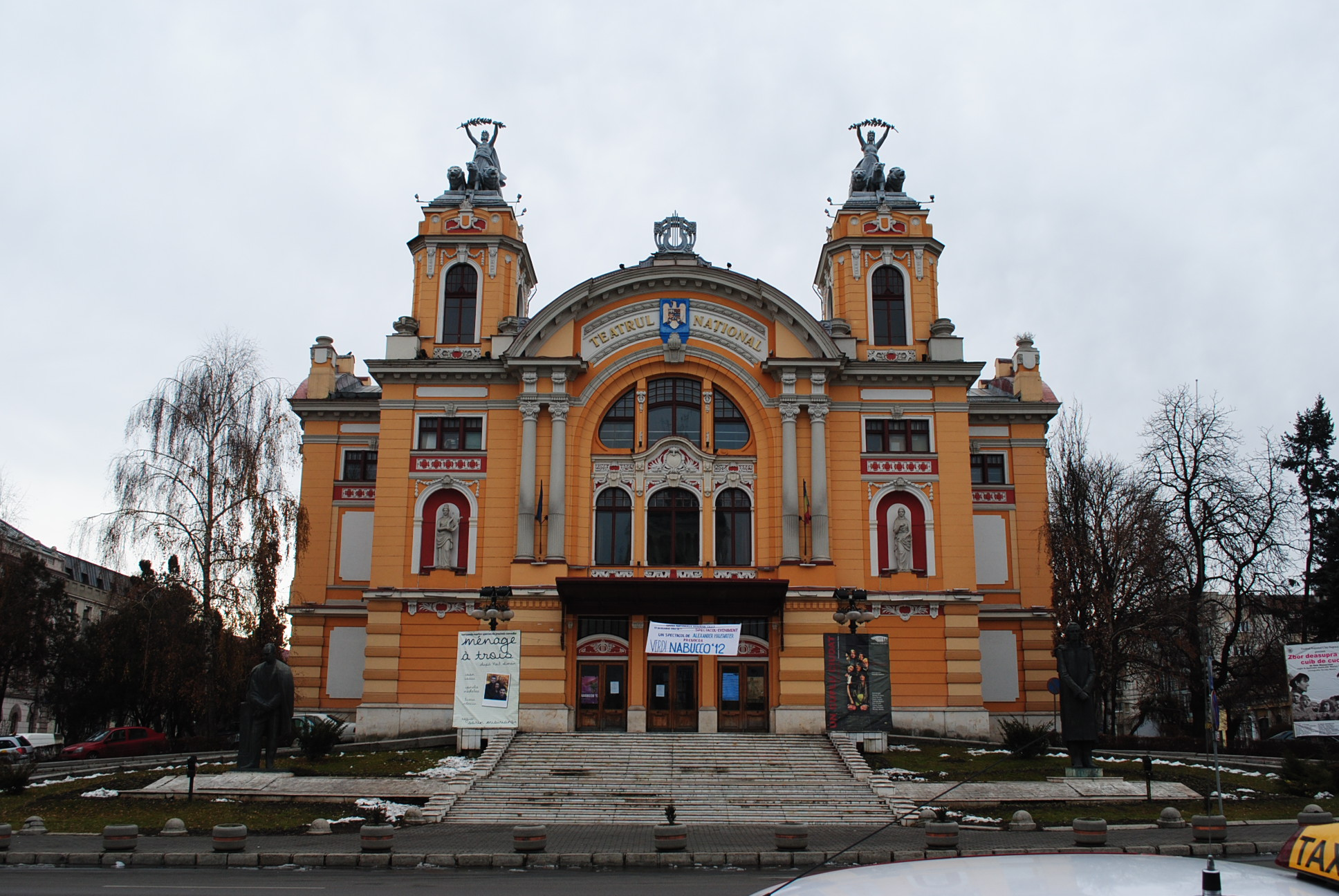 Teatrul Național, 1904-1906